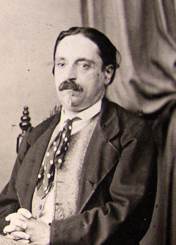 Ercole Roselli nel 1870 (circa)